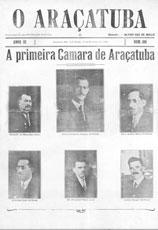 Capa do jornal O Araçatuba de 18 de fevereiro de 1922, n°109, anunciando a instalação de Araçatuba.